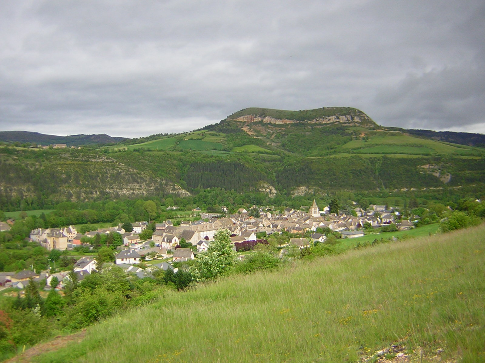 Une vue de Chirac et du st-bonnet